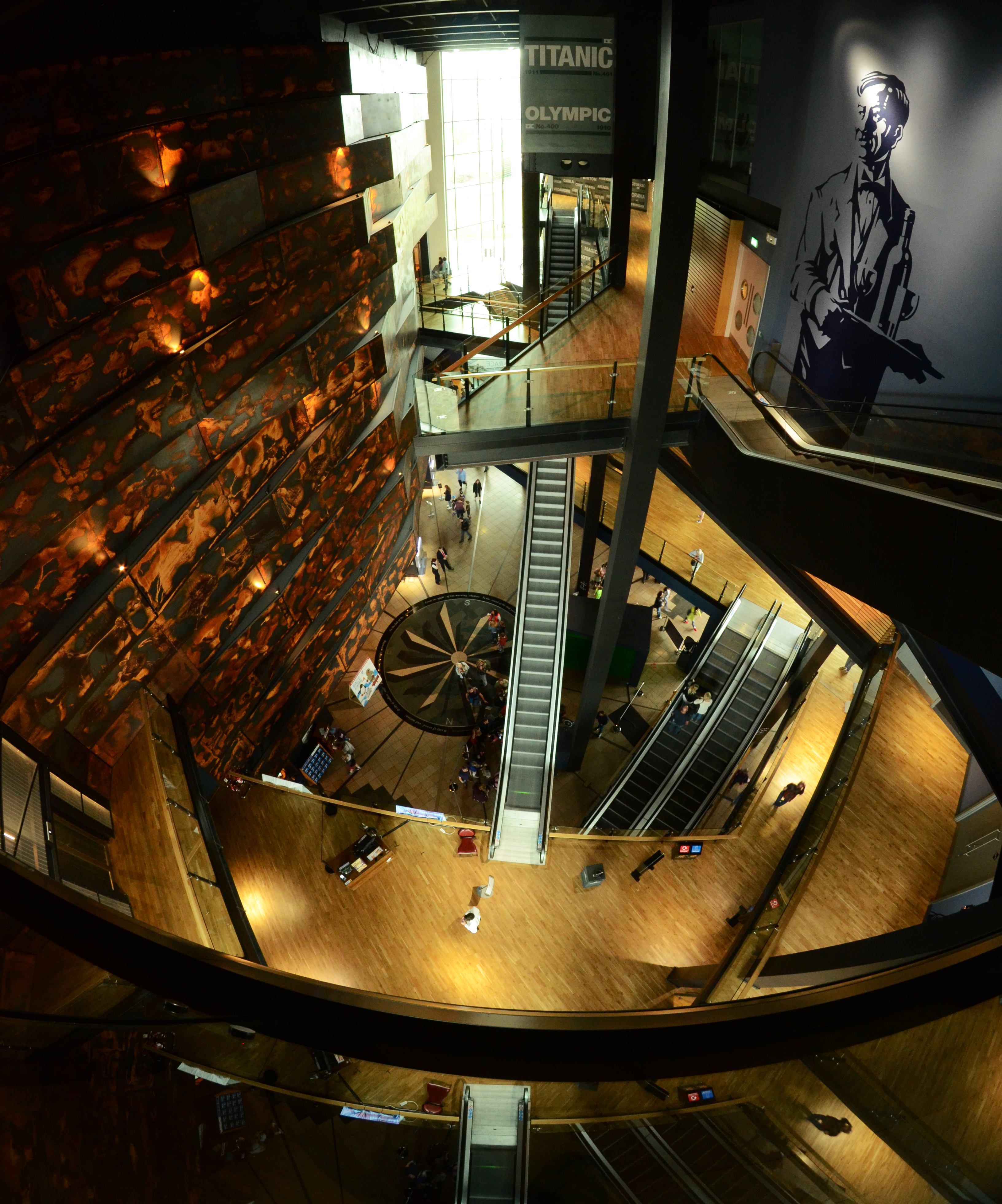 Het interieur van het Titanicmuseum.